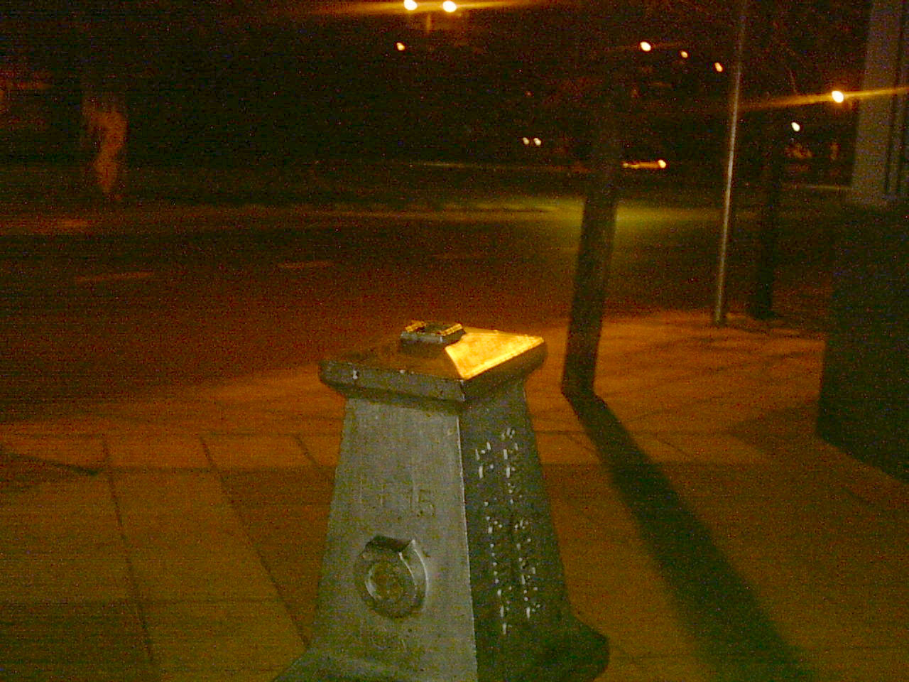 Mojón de separación entre la Ciudad de Buenos Aires y la provincia de buenos aires ubicado en la colectora norte de General paz sobre la línea imaginaria que resulta de la prolongación de la línea de edificación, lo que demuestra que la vereda y calzada de esta avenida está integramente en la Ciudad Autónoma de Buenos Aires (Capital Federal). Dicho mojón se encuentra en la esquina de Nicolás Avellaneda y Avenida General Paz (partido de Tres de Febrero).